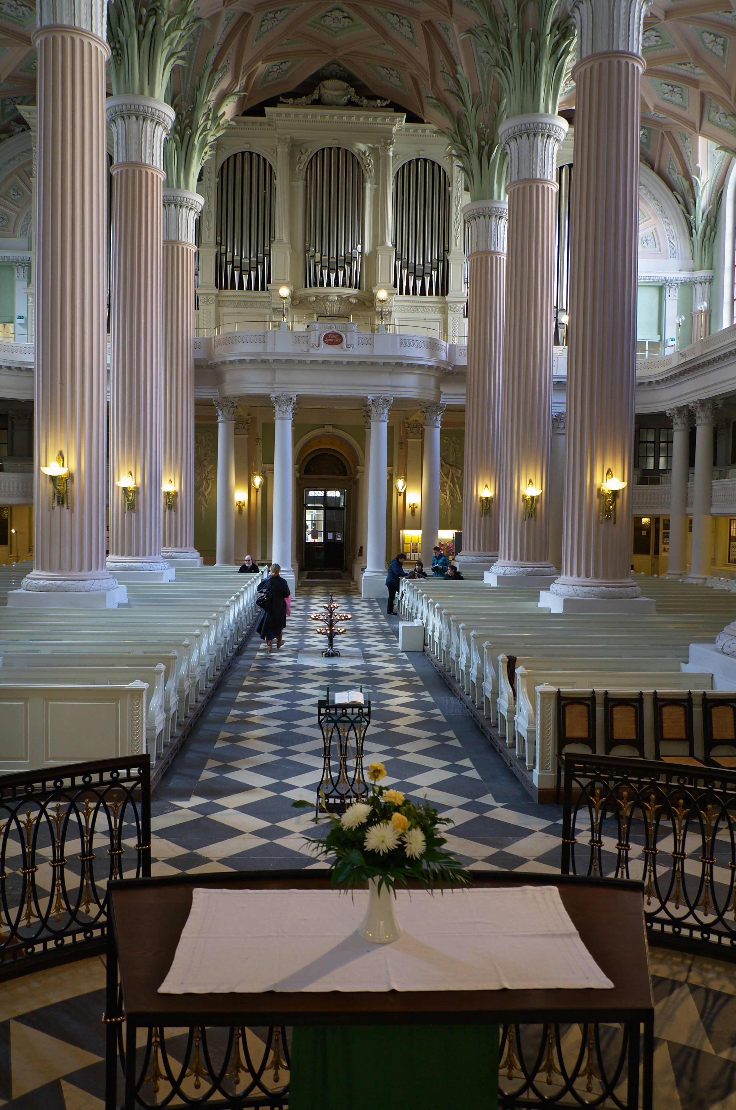 Innenansicht Nikolaikirche, Leipzig 2011.